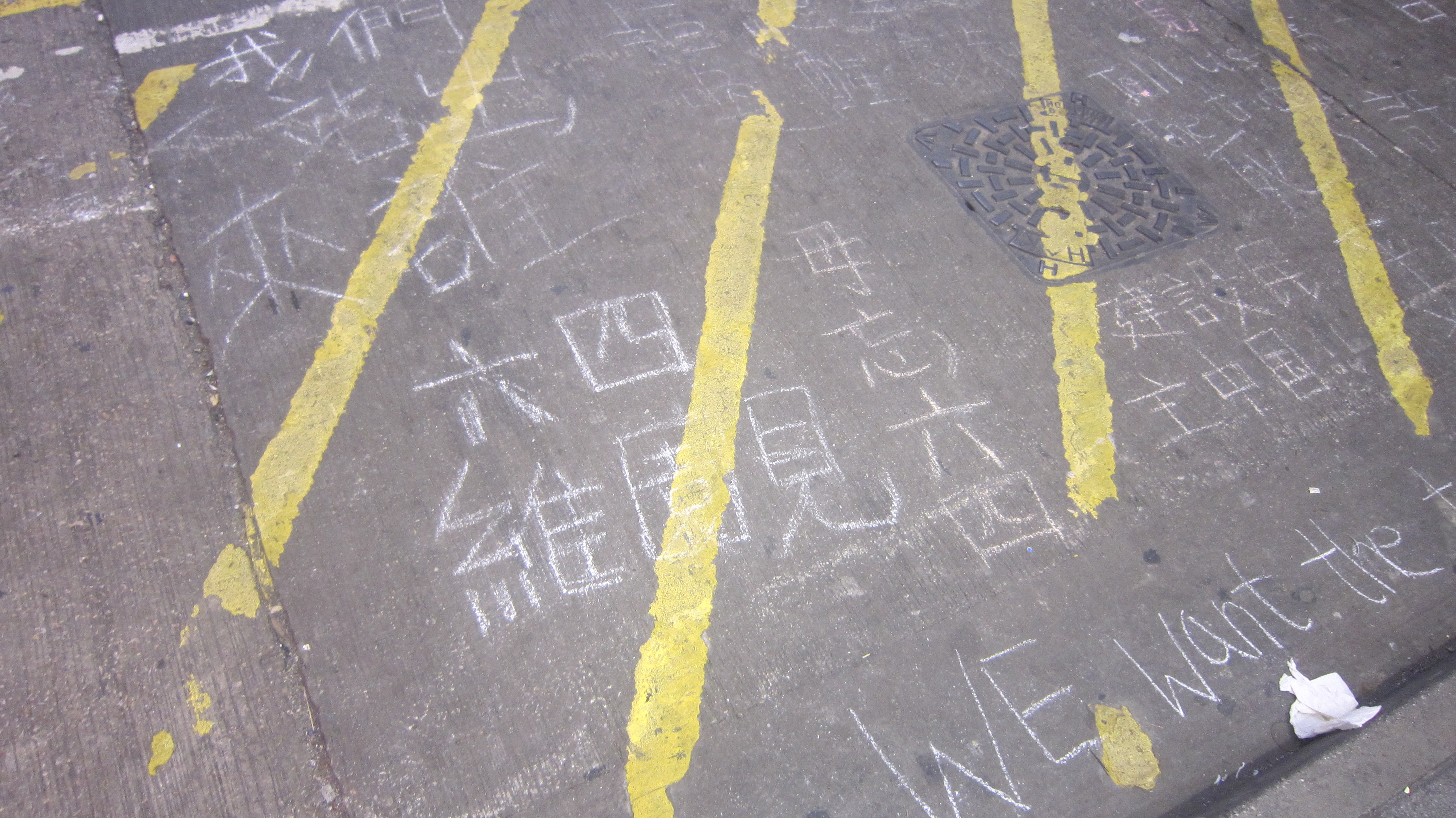 22º aniversário de Massacre de 4 de Junho em Rua de Sai Yeung Choi, Mongkok, Hong Kong